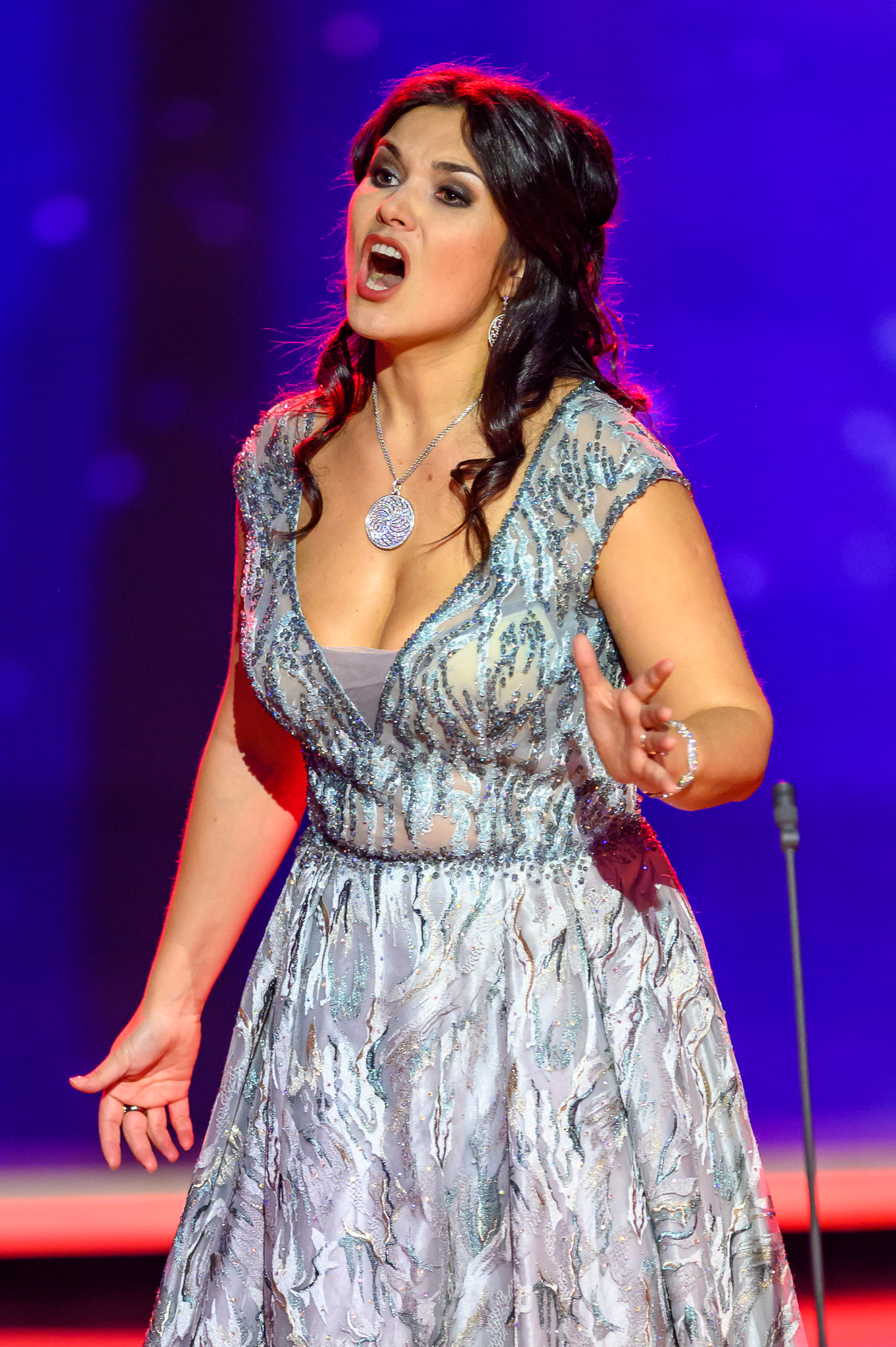 BR,Bayerisches Fernsehen,Frankenhalle,Live-Sendung,Olga Peretyatko,Sternstunden-Gala,Sternstundengala